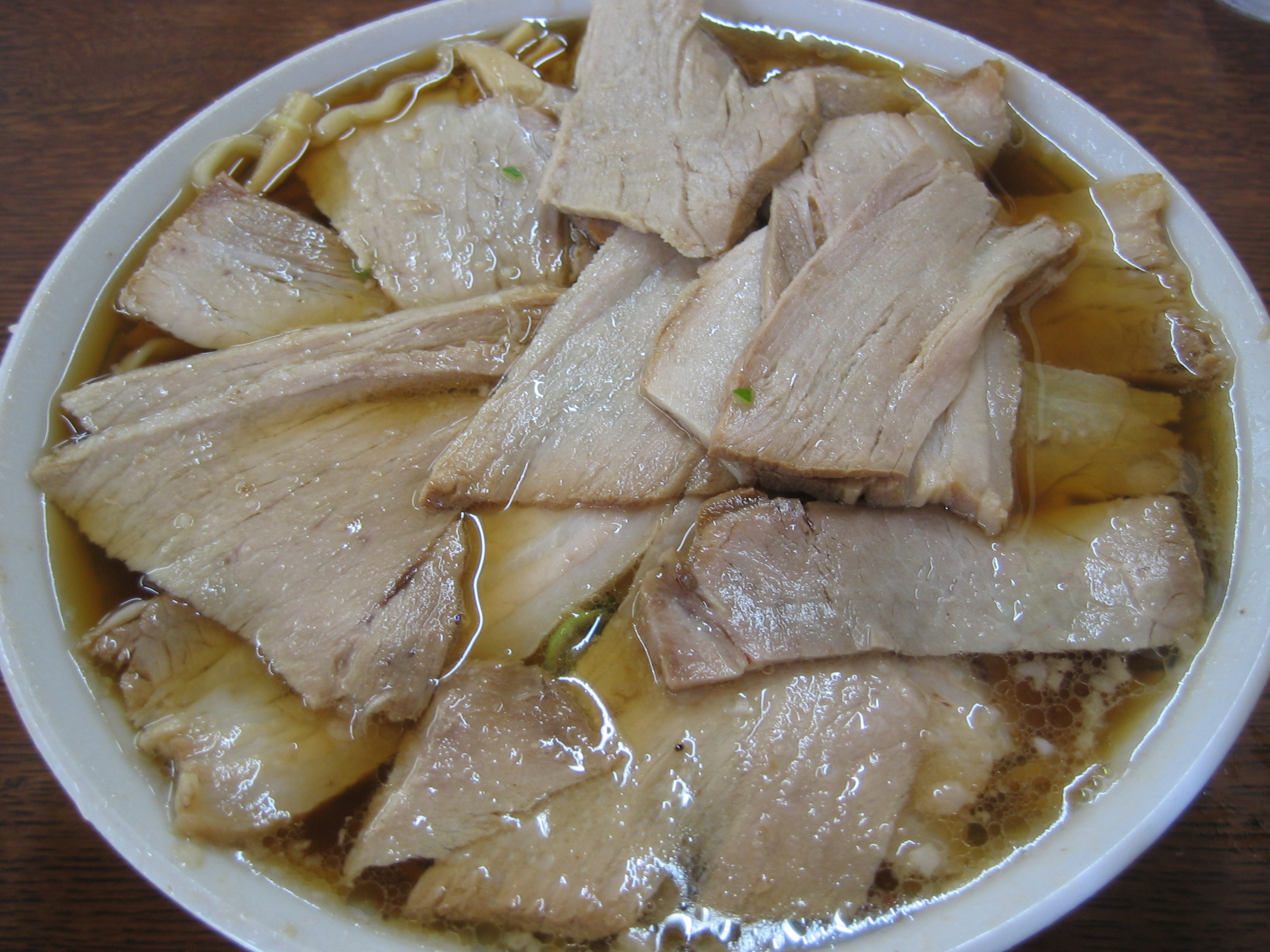 Taken at Kitakata, Fukushima, Japan. 本場喜多方の「あべ食堂」のチャーシューメン。チャーシューでメンが見えません～